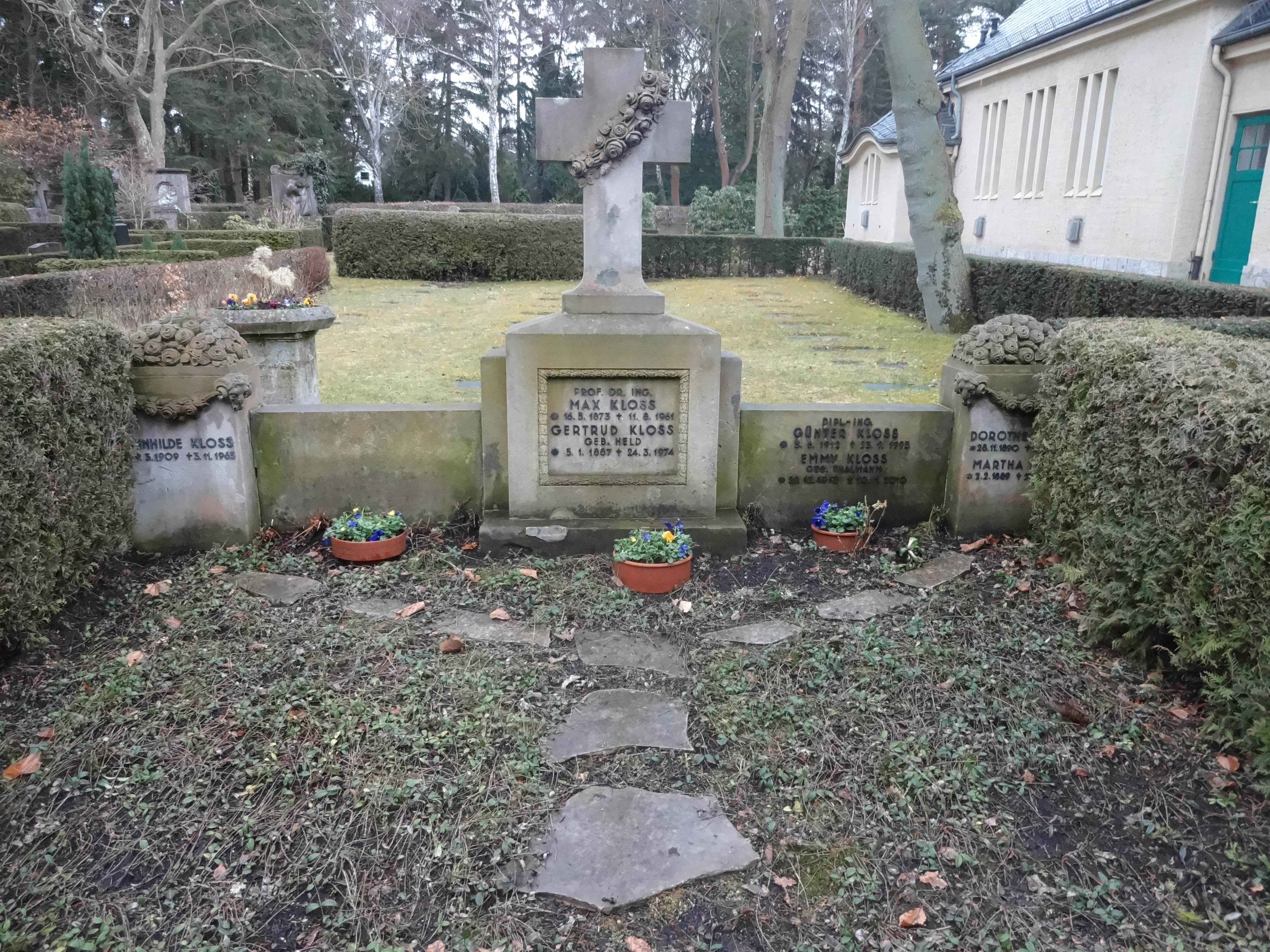 Grab von Prof.Max Kloss auf dem Evangelischen Kirchhof Nikolassee in Berlin